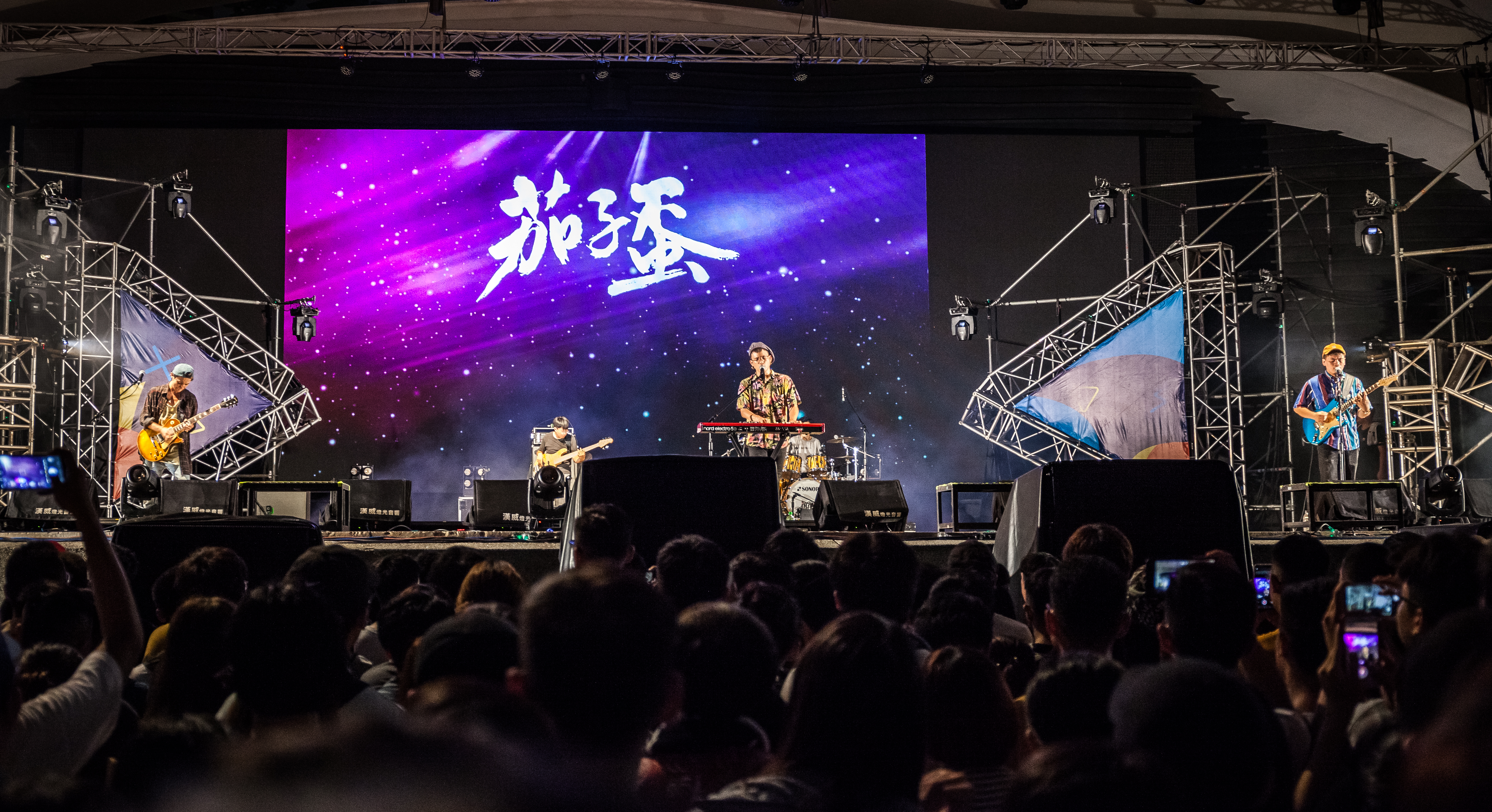 茄子蛋於台中市文心森林公園「2019搖滾台中」演出